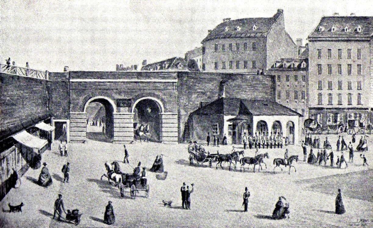 Rotenturmtor in Wien, wahrscheinlich 1840